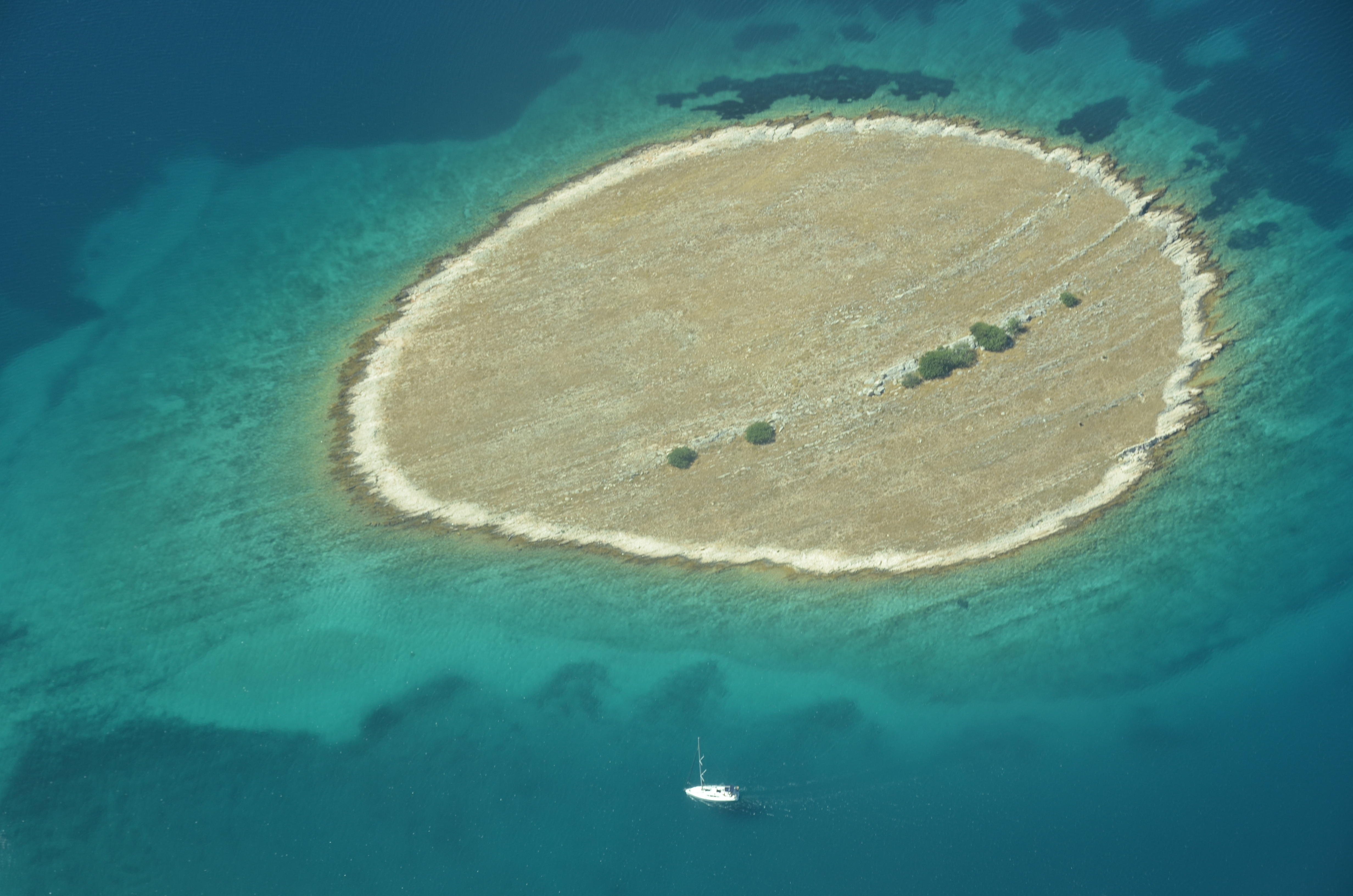 Luftbild von Otocic Striznjak